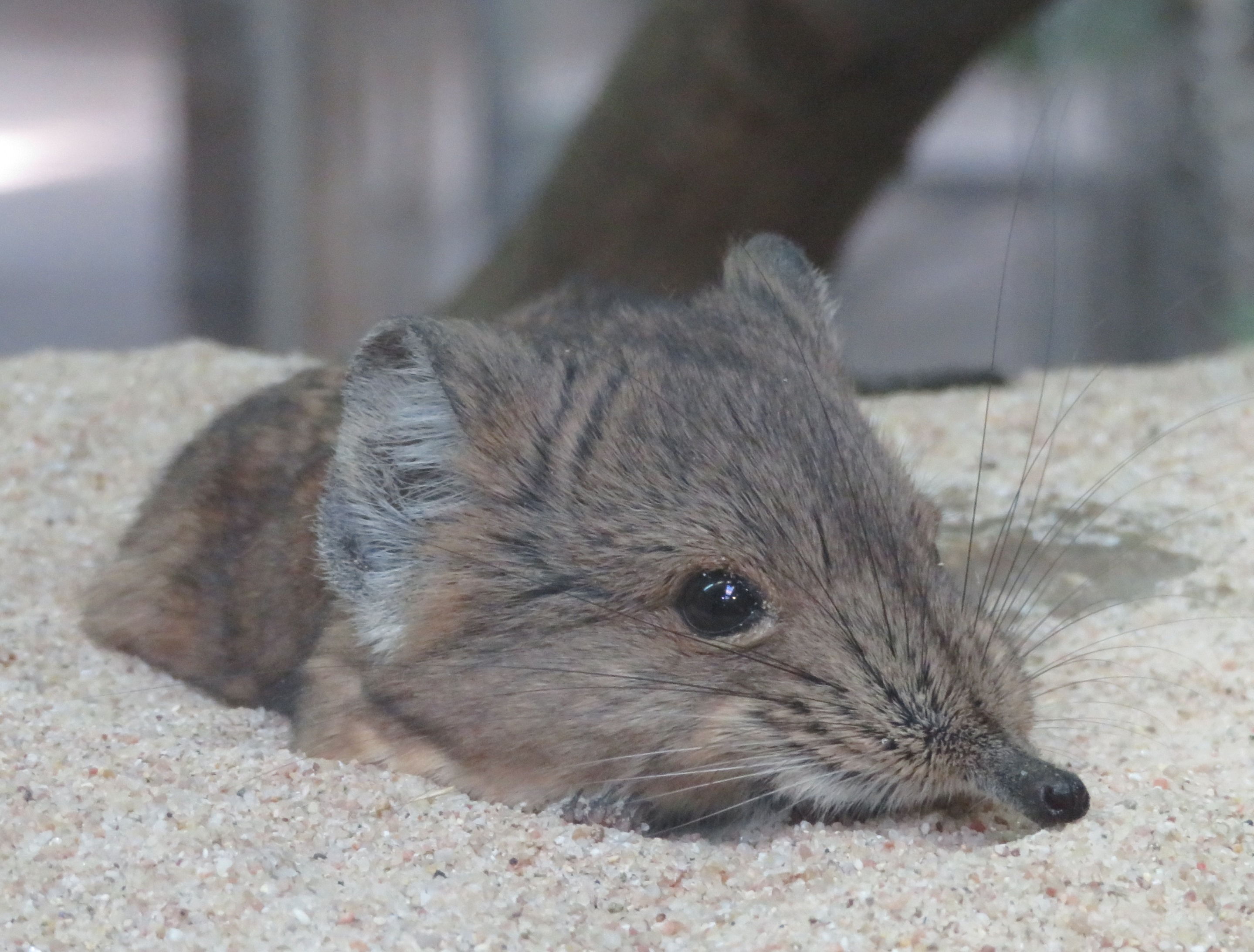 Kurzohrrüsselspringer